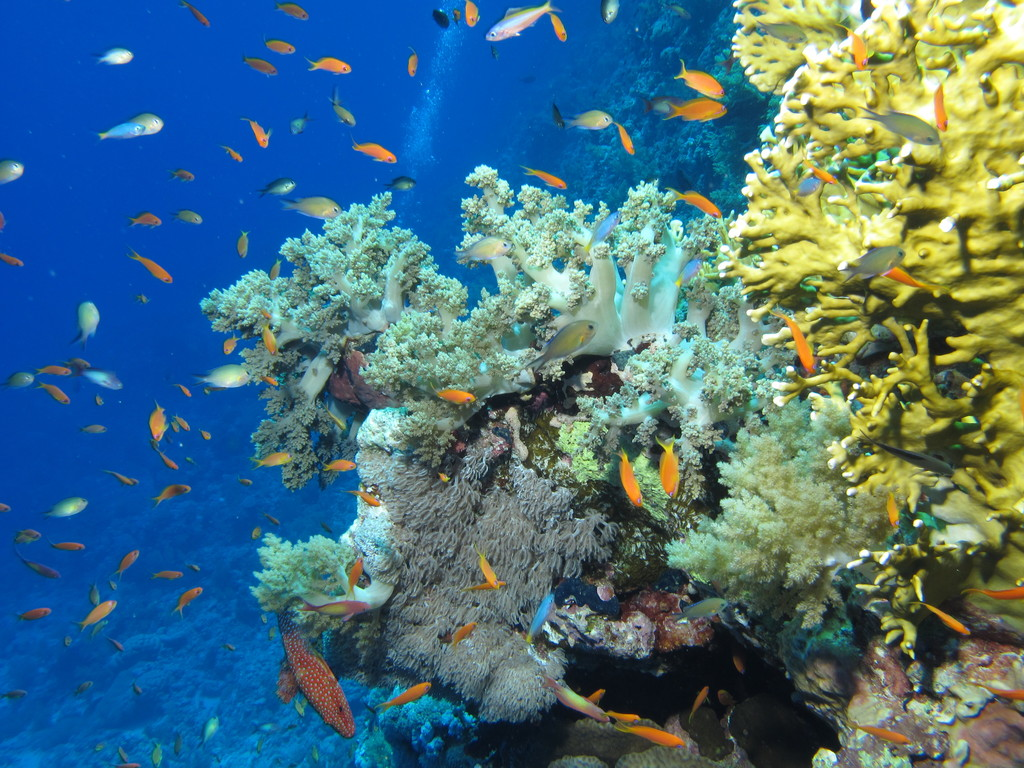 Delight